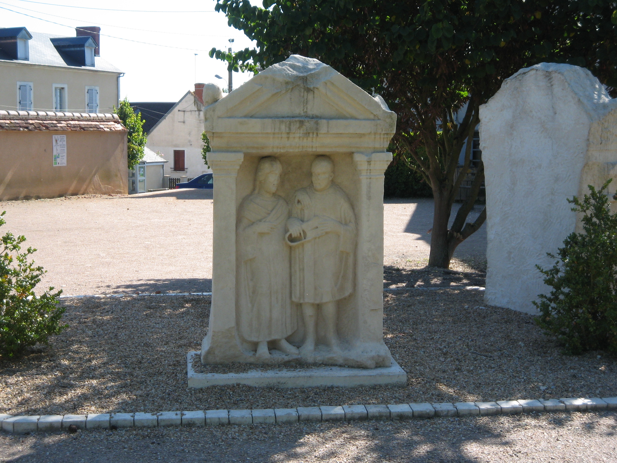 Moulage d'une stèle funéraire, trouvée à Saint Ambroix, fin du II°.